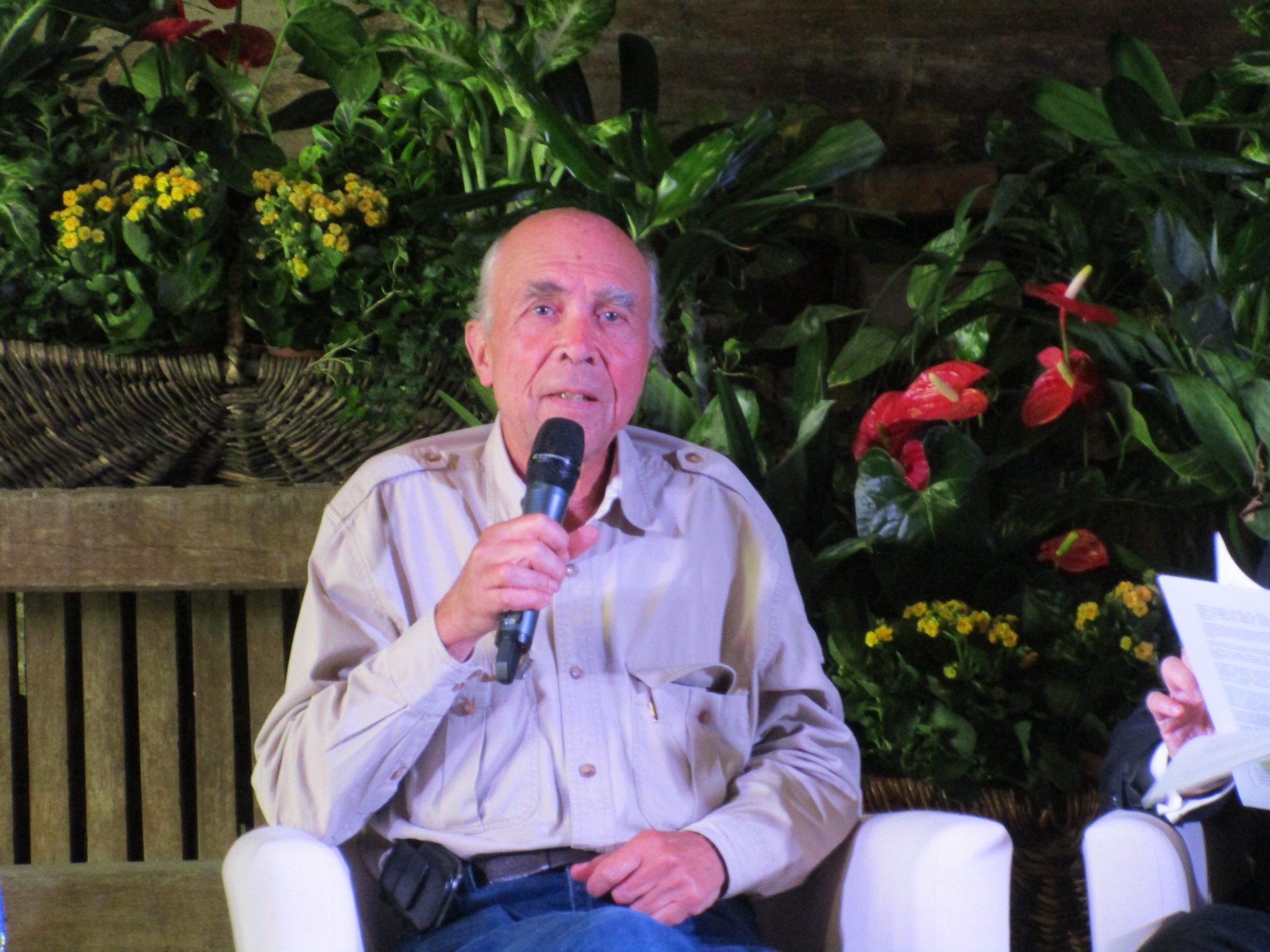 Conférence en 2016, avec Aubert de Villaine (domaine de la Romanée Conti) sur l'inscription du vignoble de Bourgogne au Patrimoine Mondiale de l'Humanité, au salon Livres en Vignes du Château du Clos de Vougeot